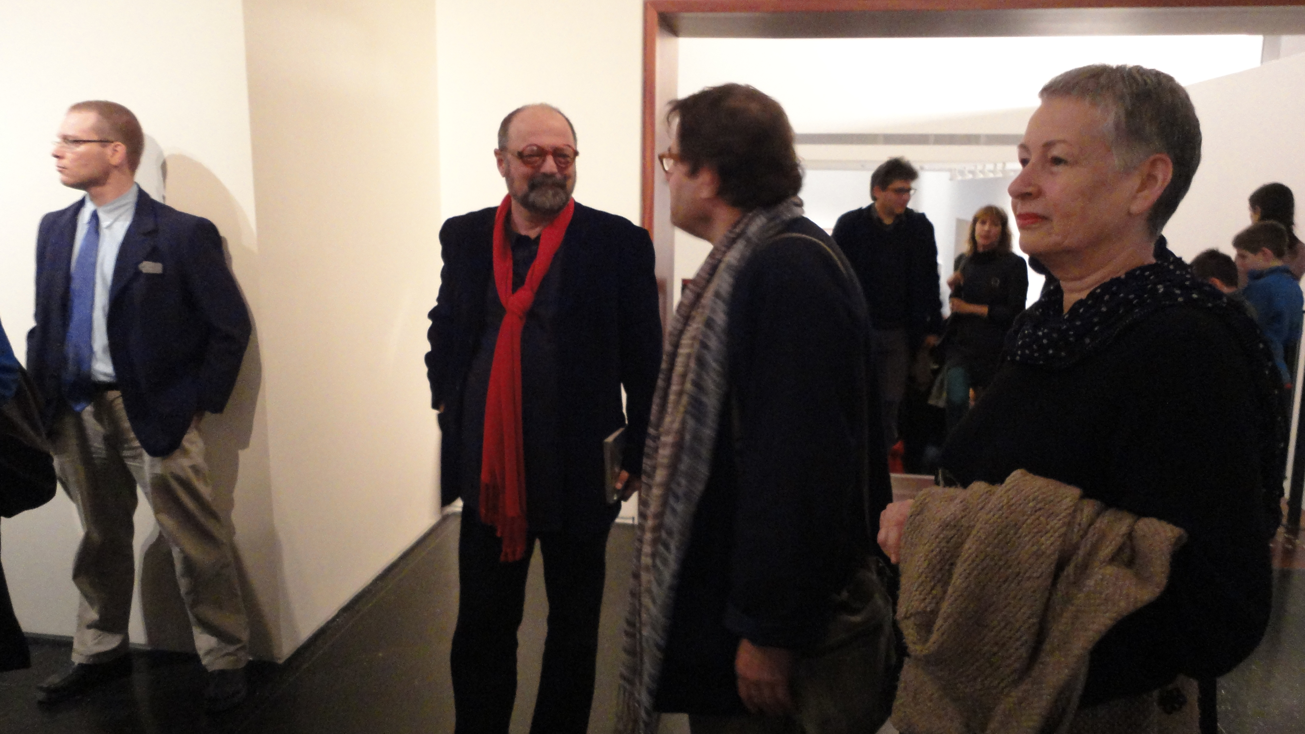 פתיחת "עונה של אמנות ישראלית" במוזיאון ישראל, ירושלים, 18 בדצמבר 2012 פתיחת תערוכות של יהשוע בורקובסקי, נלי אגסי וישראל הרשברג ותערוכת האוסף "מרחבים: רכישות חדשות ועבודות מהאוסף"